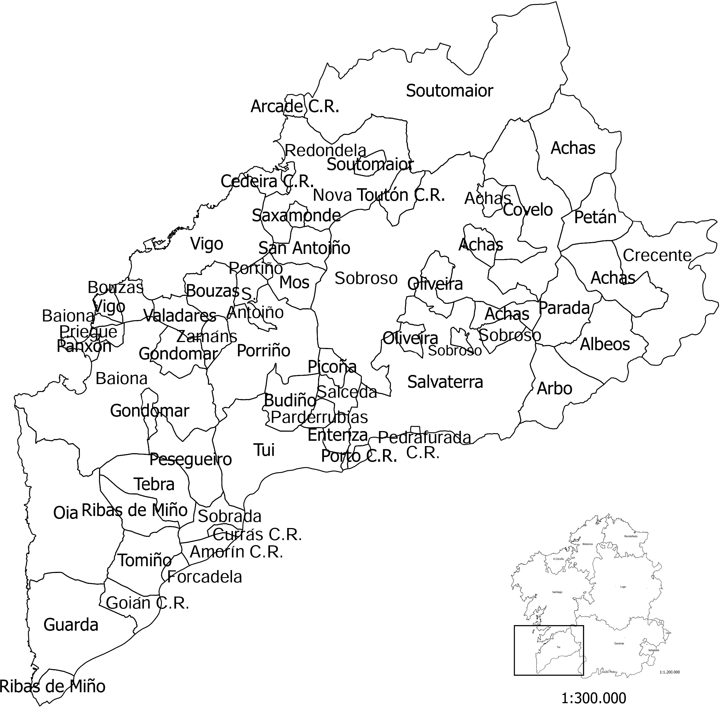 Xurisdicións da provincia de Tui.